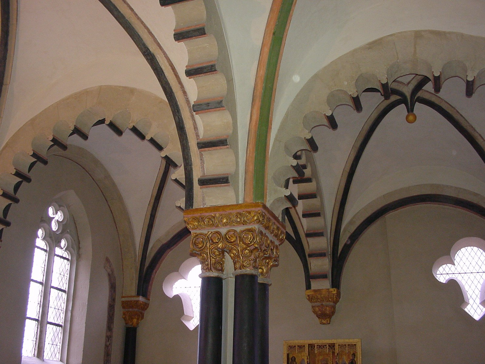 Neuenburg - Gewölbe in der Oberkirche der Doppelkapelle.